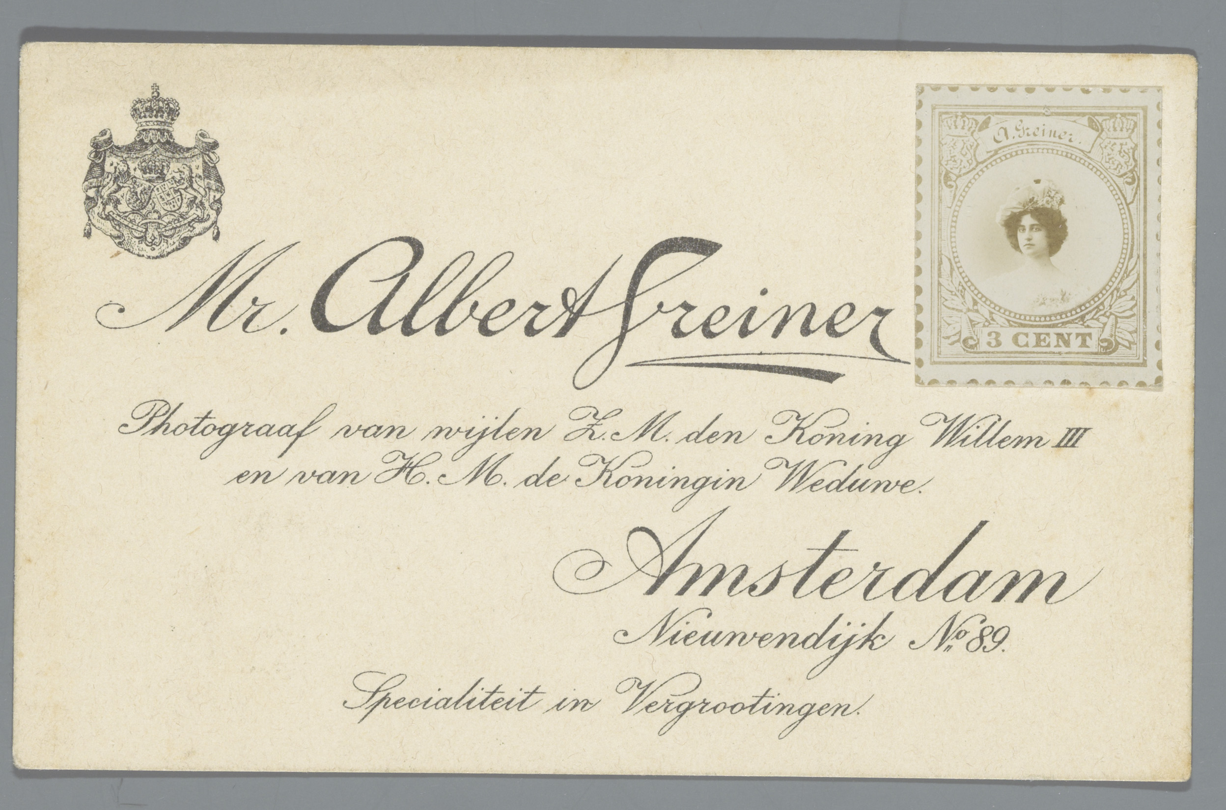 IdentificatieTitel(s): Portret van een vrouw (op de postzegel) op het visistekaartje van de fotograaf Albert GreinerObjecttype: foto Objectnummer: RP-F-F15195VervaardigingVervaardiger: fotograaf: Albert Greiner (vermeld op object)Datering: ca. 1890Fysieke kenmerken: albuminedrukTechniek: albuminedrukAfmetingen: geheel: h 64 mm × b 104 mmVerwerving en rechtenVerwerving: overdracht van beheer 1994Copyright: Publiek domein